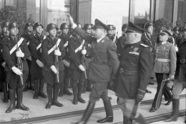 Patti di Roma. Benito Mussolini e il "poglavnik" croato Ante Pavelic fanno il saluto fascista e passano in rivista alle truppe schierate uscendo dalla stazione Ostiense.